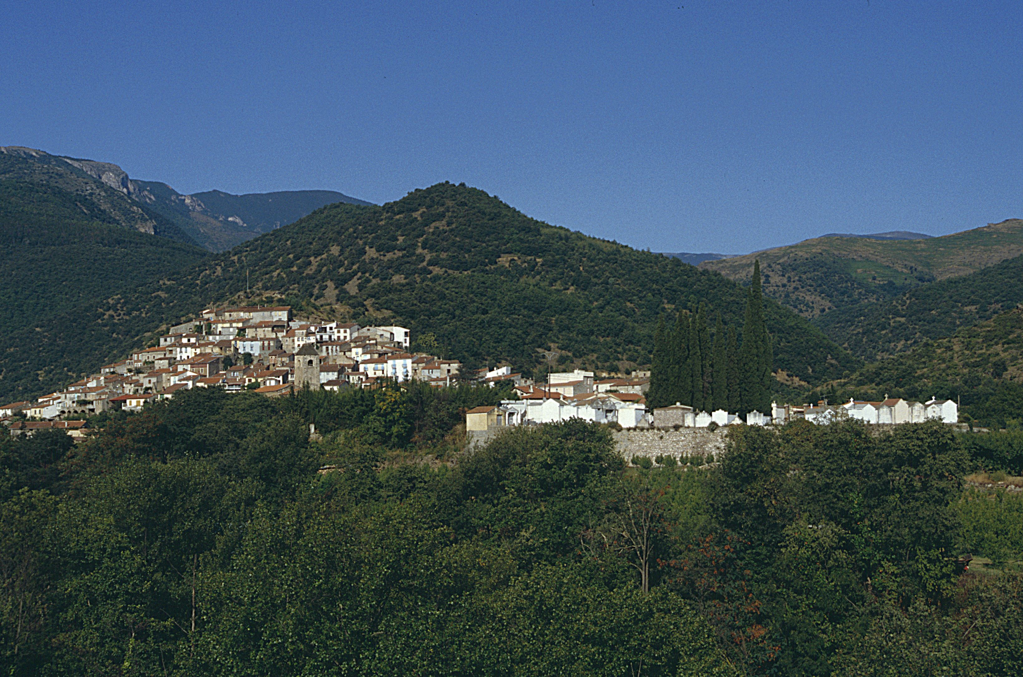 Sirach-Ria